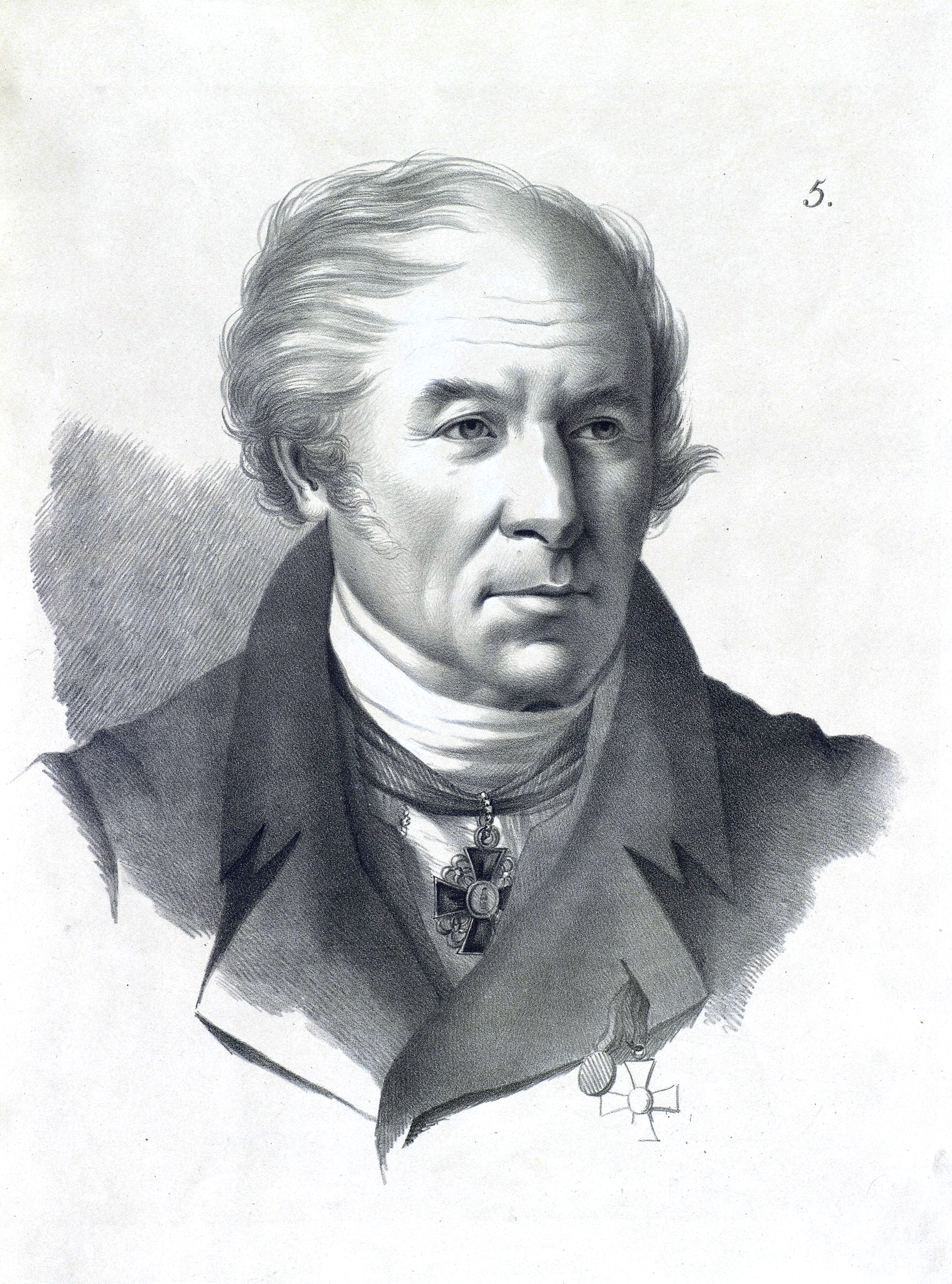 Мартос, Иван Петрович